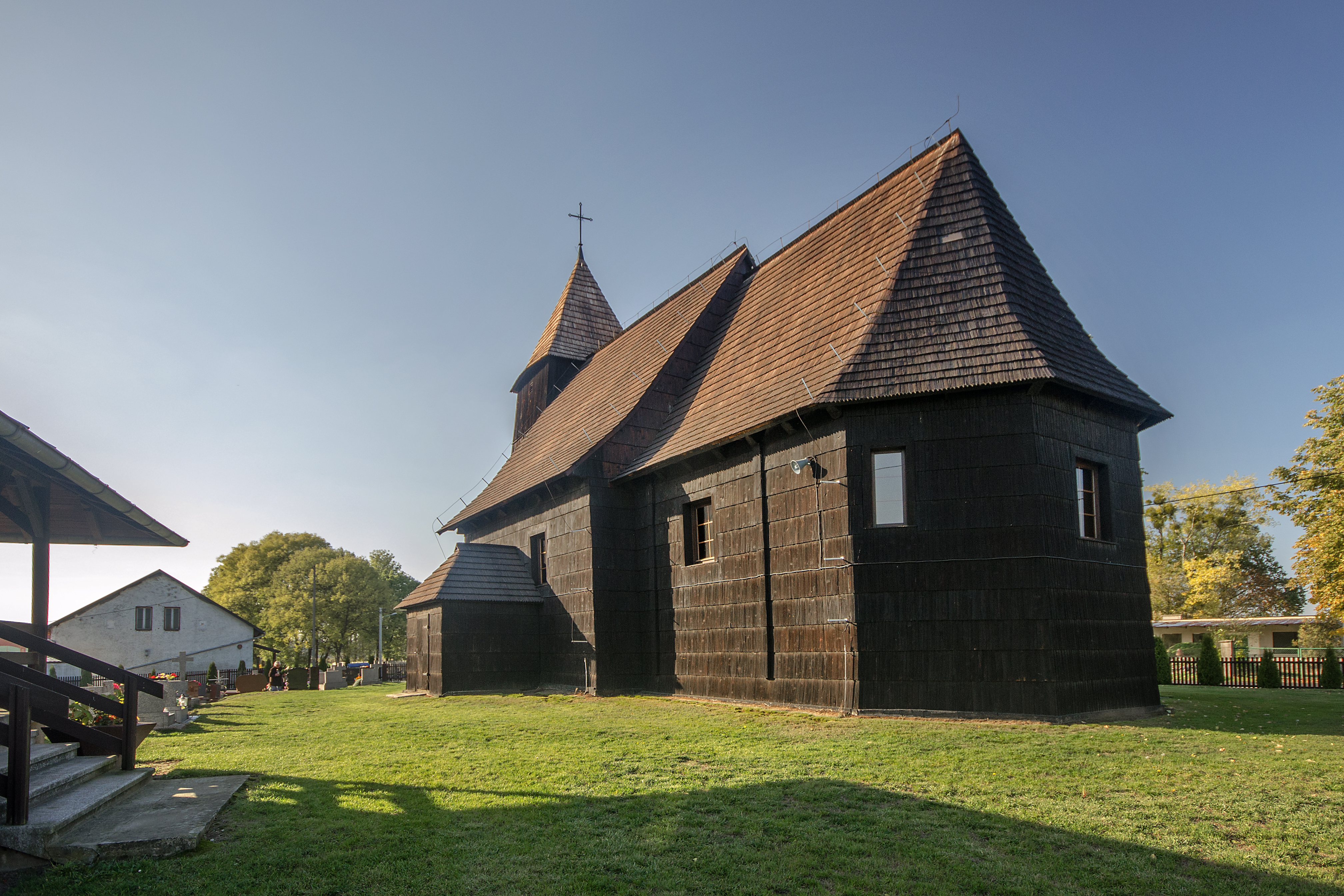 Lasowice Małe, kościół fil. p.w. św. Jakuba, ob. p.w. Wniebowzięcia NMP, 1688, 1735